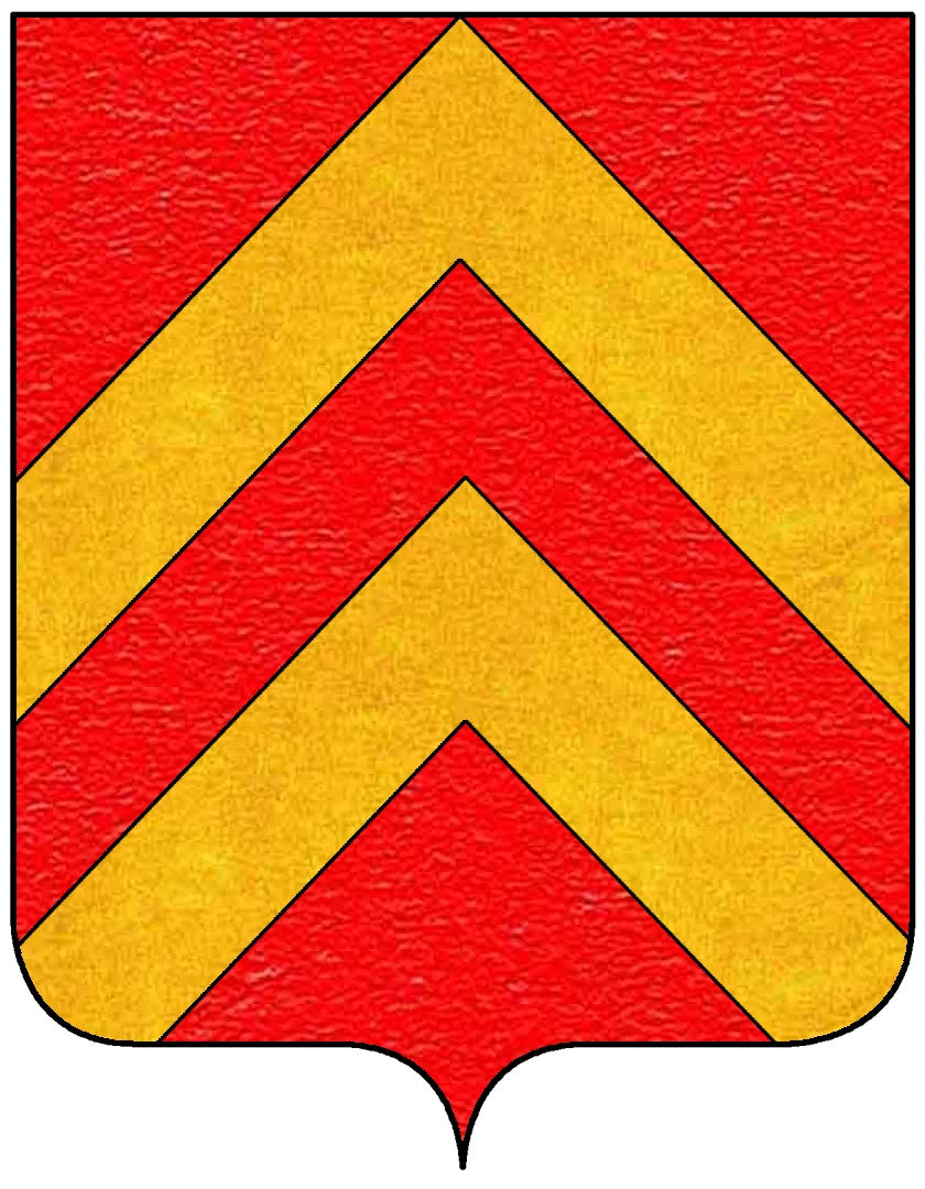 Stemma della famiglia Vitelli